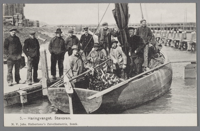 staverse jol